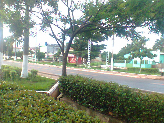 Jardins do canteiro central e rodovia Paulo Fontelles no centro de Goianésia